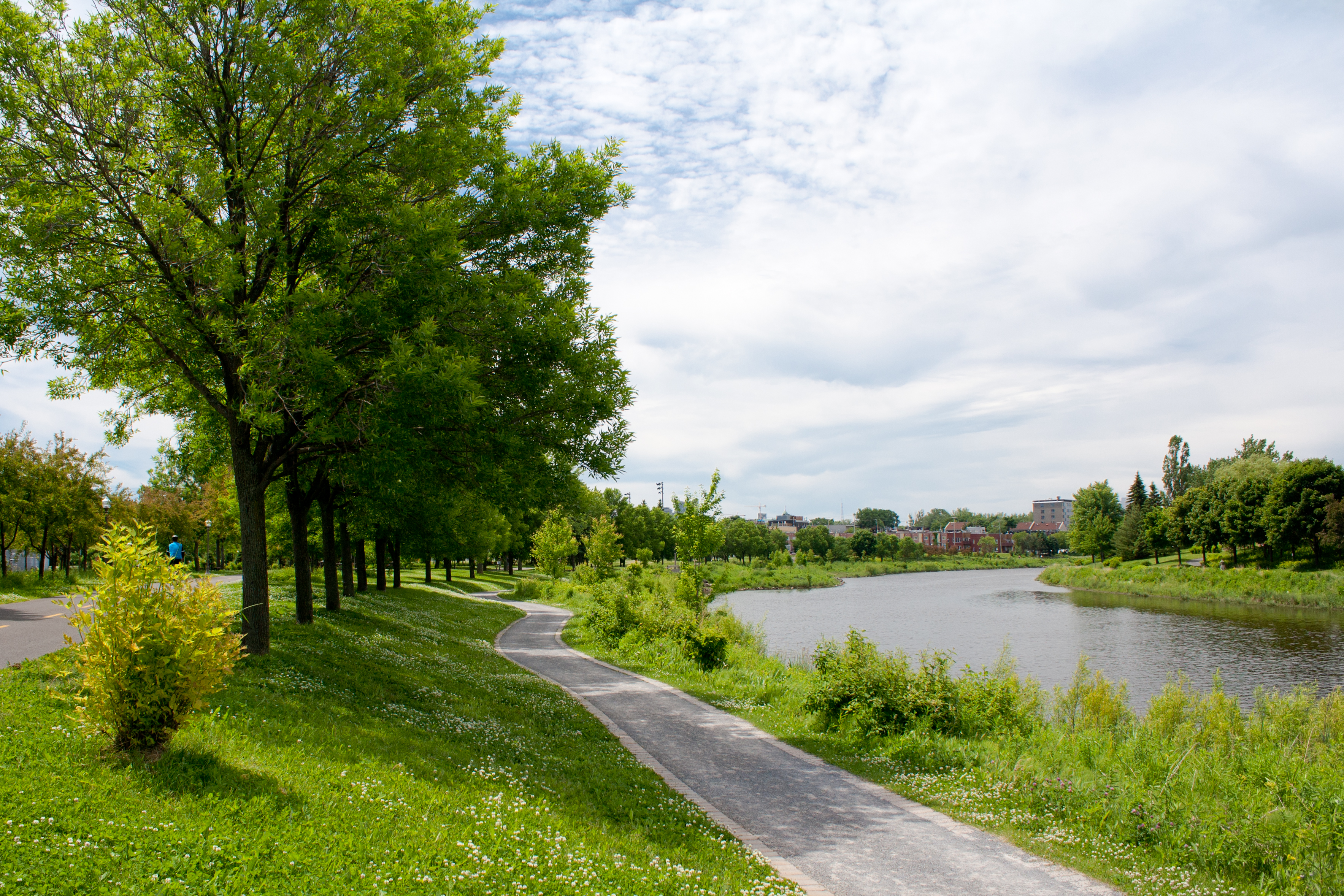 Parc linéaire de la rivière Saint-Charles, dans l'arrondissement La Cité-Limoilou de la ville de Québec. (NB: le titre est incorrect.)